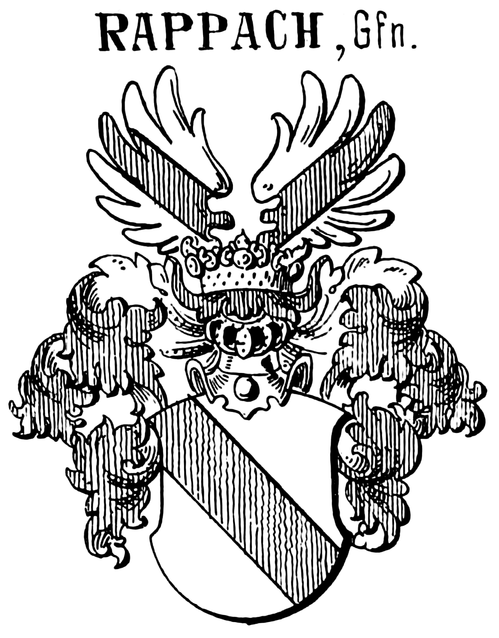 Rappach (Adelsgeschlecht), nach Siebmacher